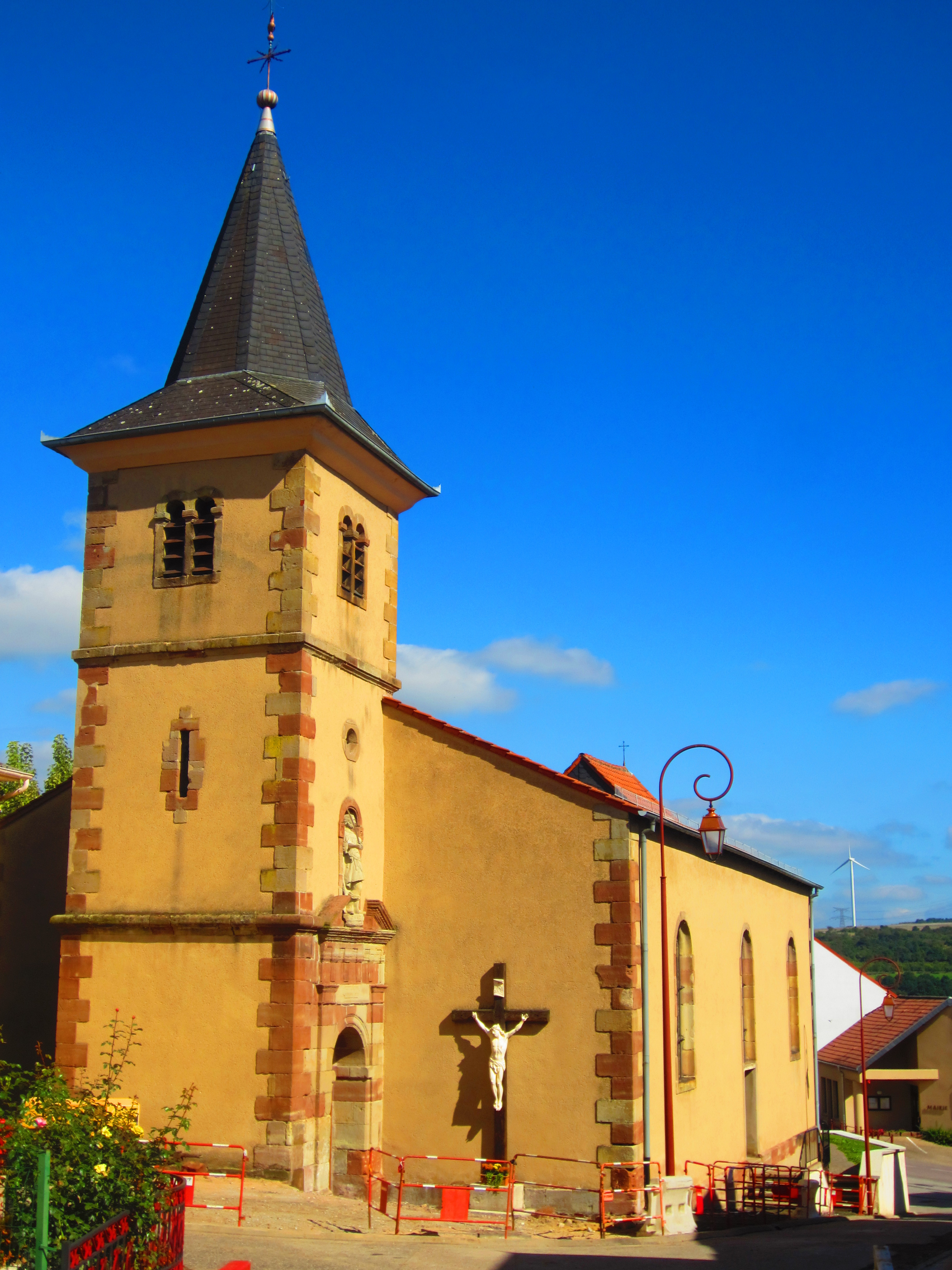 Eglise Remering